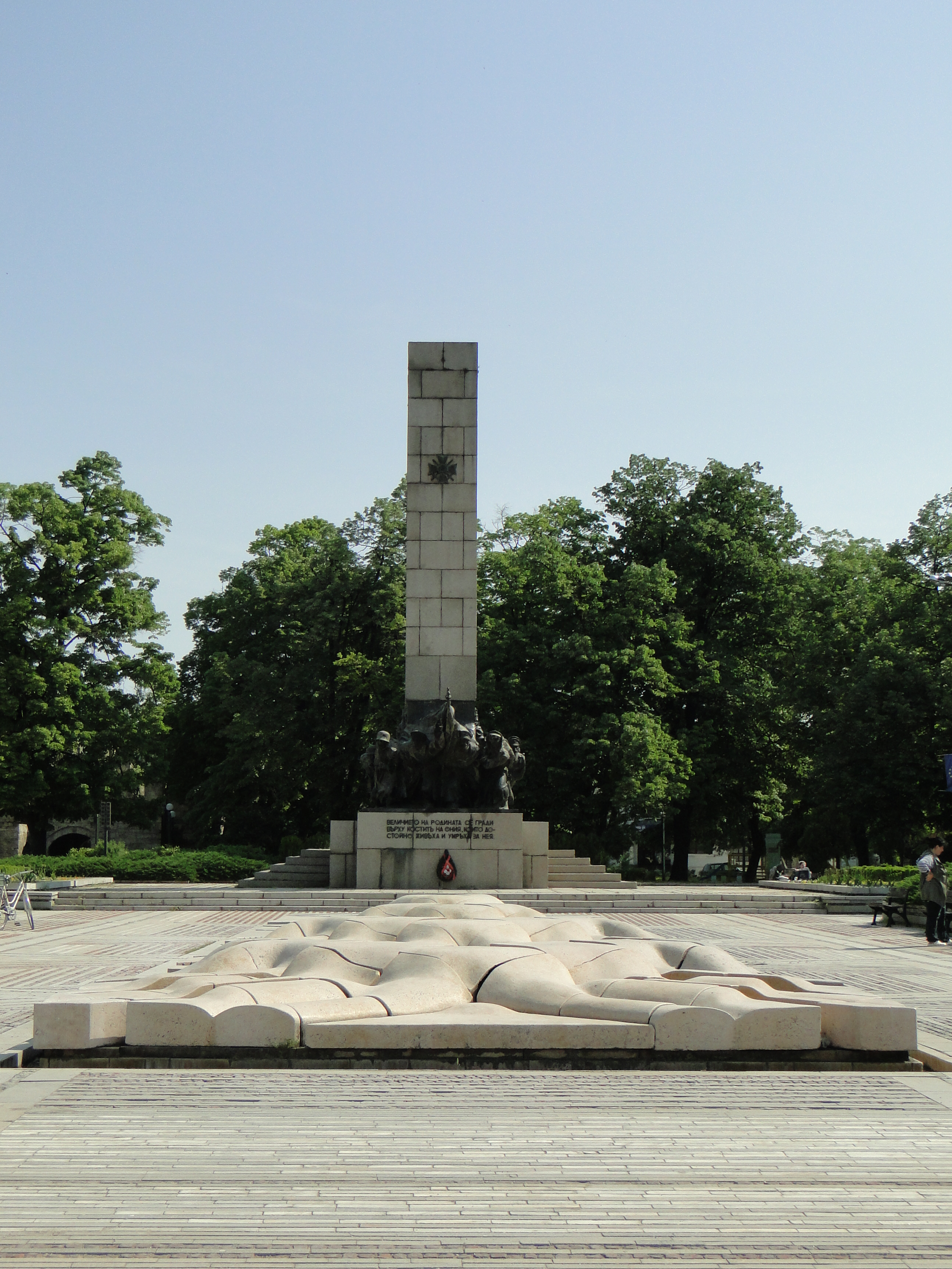 Видин, май 2013